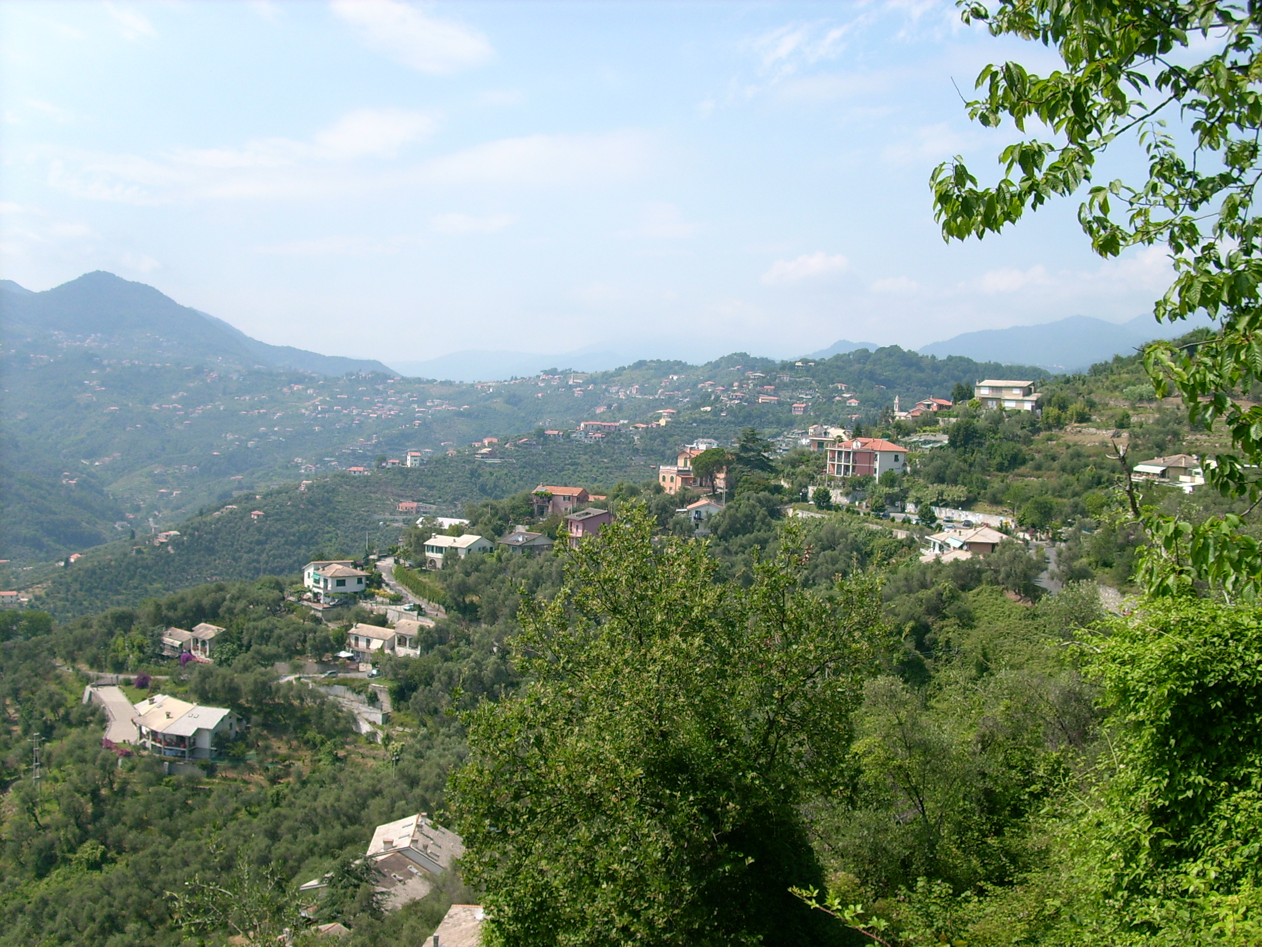 Panorama di Leivi, Liguria, Italia